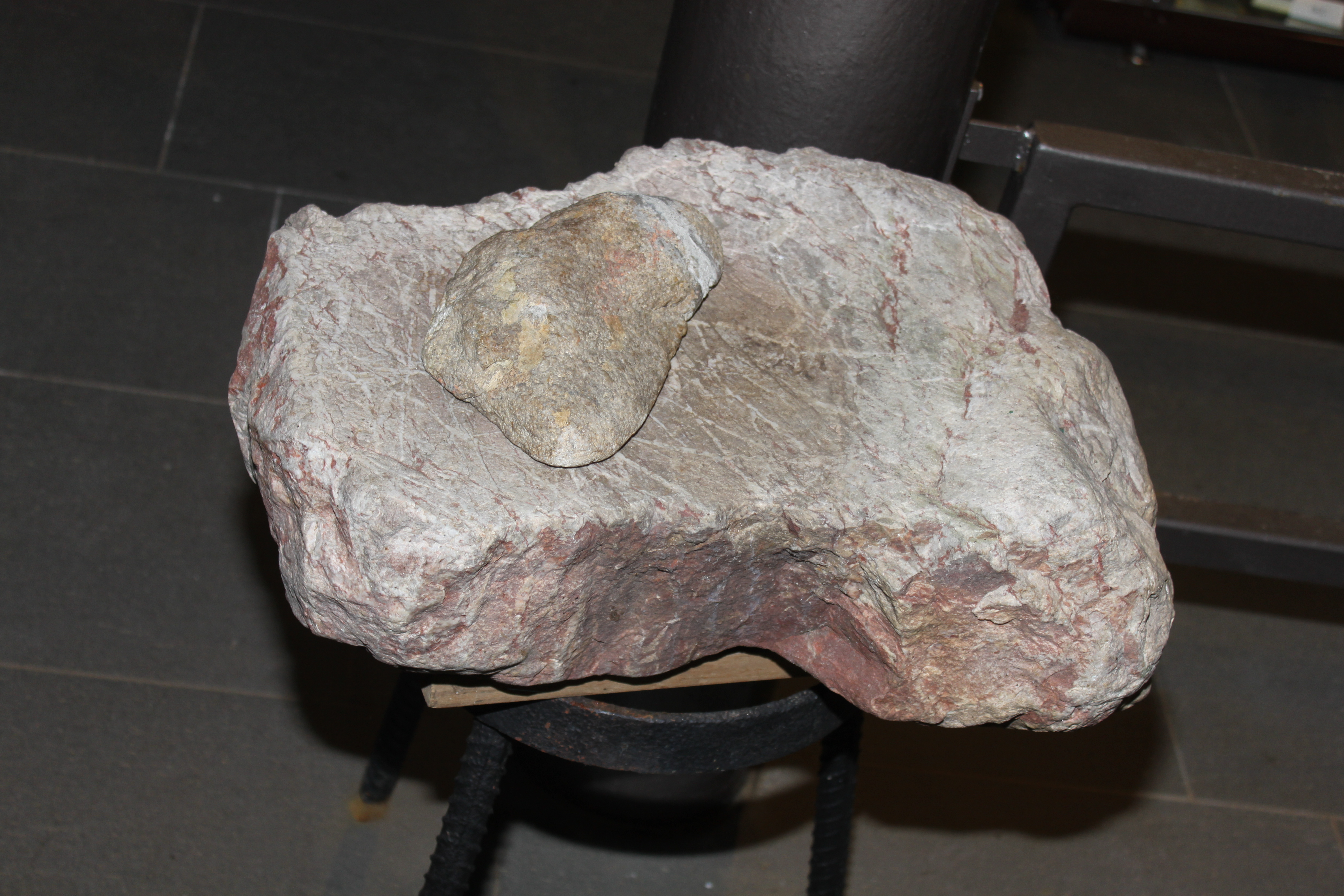 Älteste Mönchengladbacher Mühle Jungsteinzeitlicher Mahlsteinunterlieger aus Quarzit mit Reibstein, etwa 3000 v. Chr. Fundort: Acker 100 m südlich der Ziegeleigrube Dreesen. Beim Pflügen traf 1972 der Dorn des Untergrundlockerers auf den in 50 cm Tiefe schräg im Boden liegenden Stein. Eine kleine Grabung brachte ihn und de unmittelbar daneben liegenden Reibstein zu Tage, außerdem noch das Bruchstück einen geschliffenen Walzensteinbeiles. Archäologisches Museum Wasserturm Rheindahlen 41179 Mönchengladbach Germany